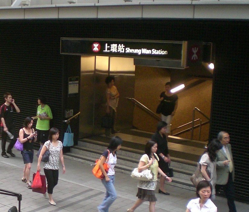 Sheung Wan MTR Station, Exit E3